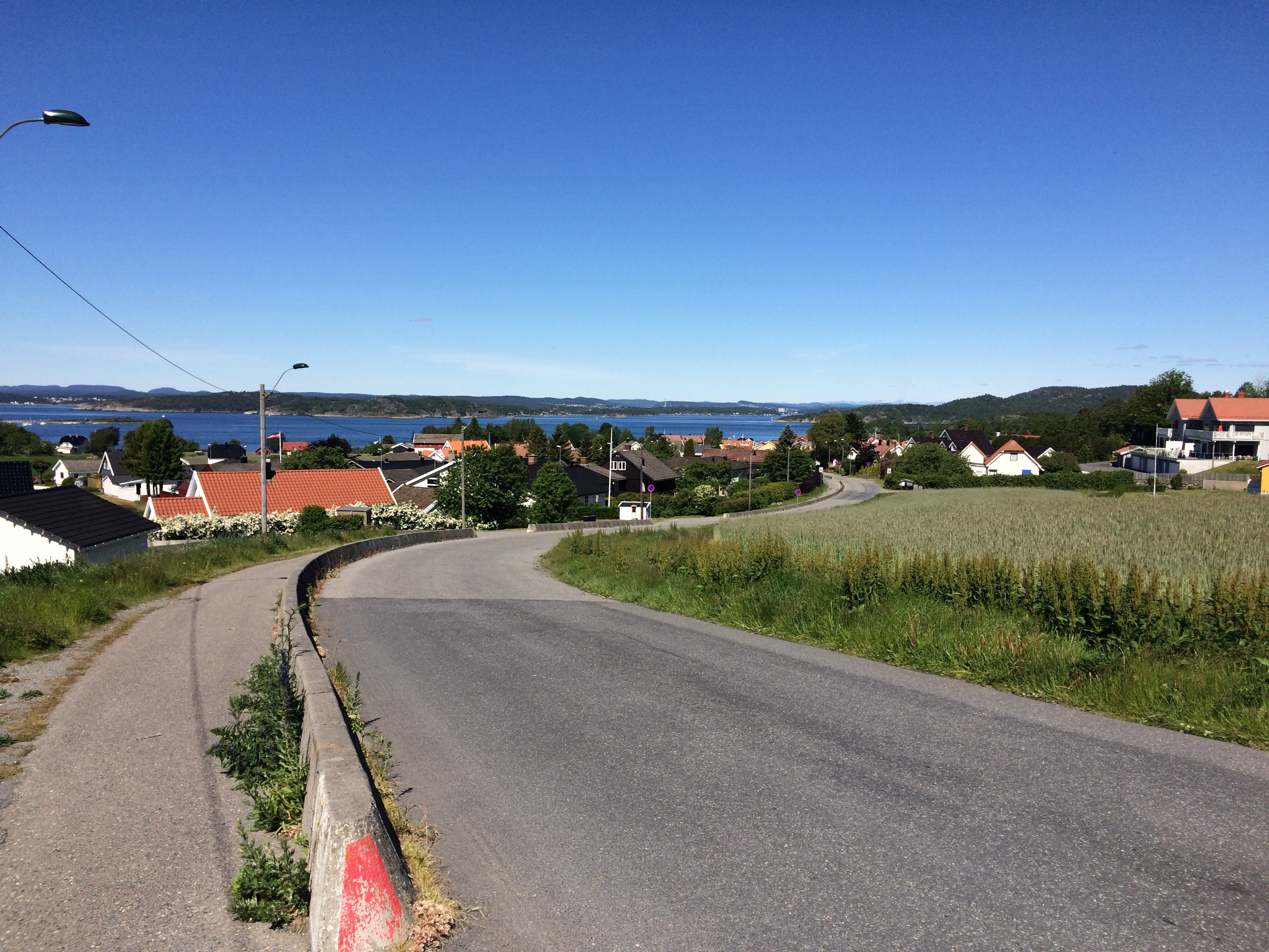 Helgeroa